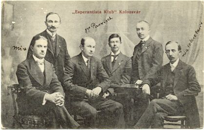 La Esperanto-grupo de Kolozsvár (Cluj-Napoca) en 1907. Videblas interalie s-ro Parrisch kaj la sekretario de la grupo, s-ro Amon.